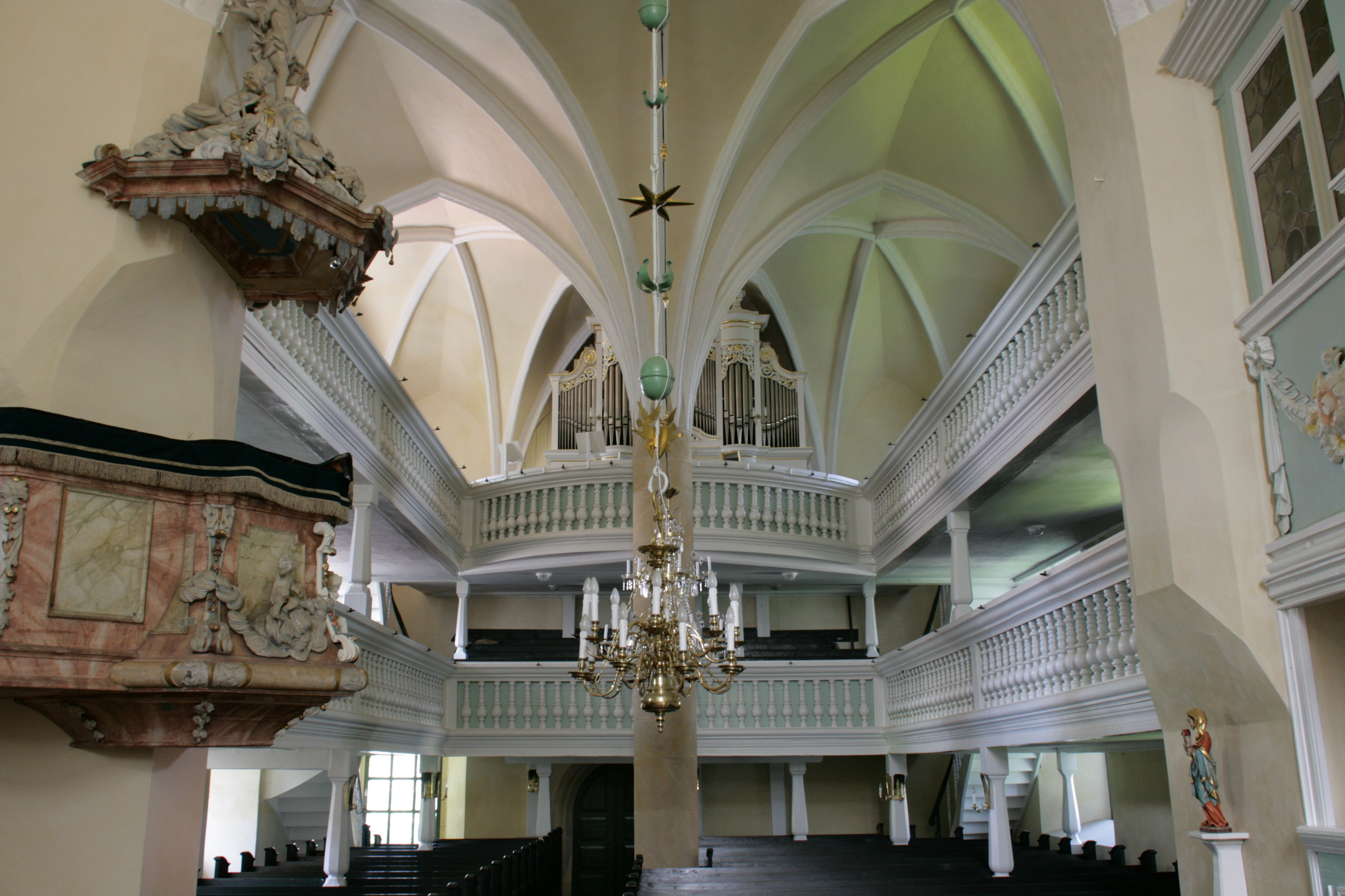 Evangelische Kirche Ebersbach, Kirchberg in Ebersbach, Schöpstal